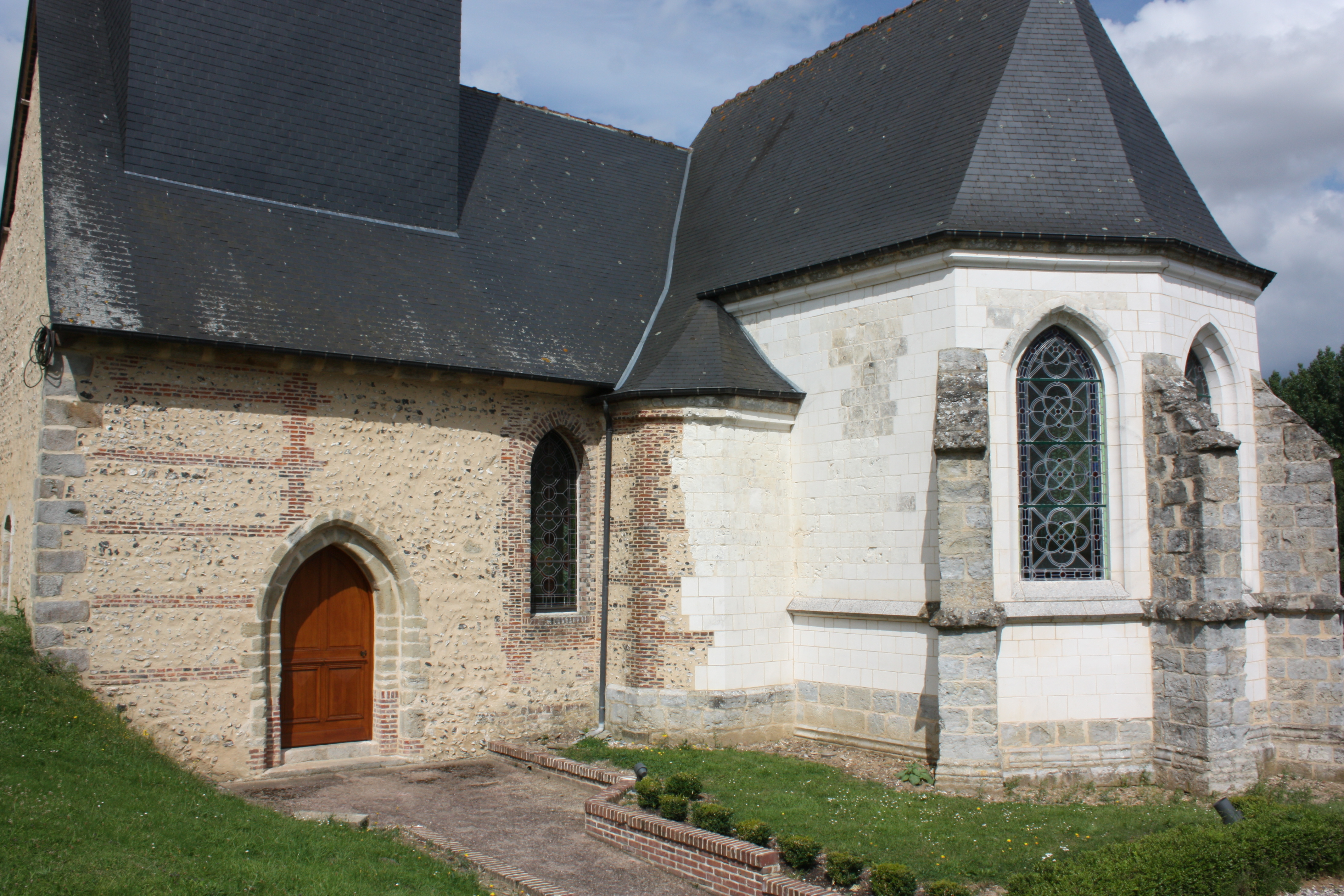 Lucy, église Notre-Dame, vue du Sud.